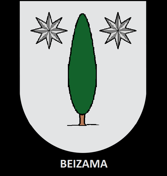 Escudo del municipio de Beizama, provicia de Gipuzkoa, Euskal Herria, España Beizama herriko armarria,Gipuzkoako probintzia, Euskal Herria, Espainia.